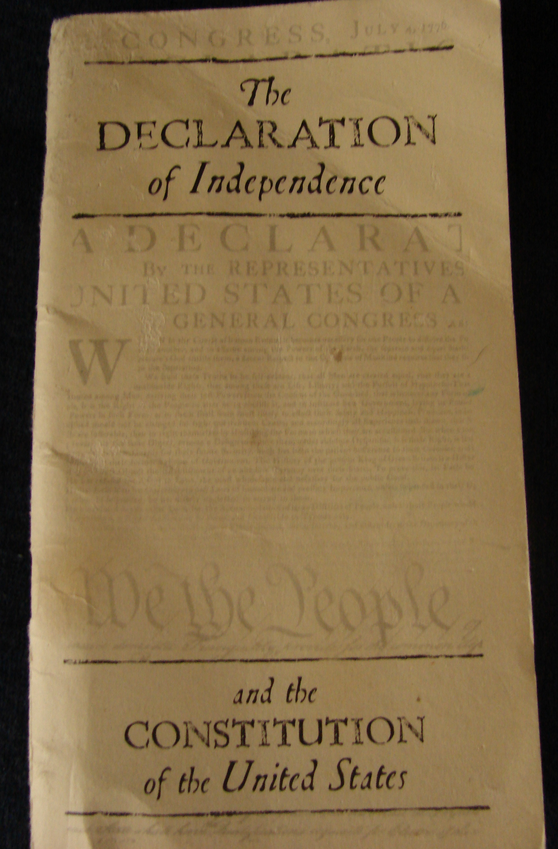 A pocket constitution